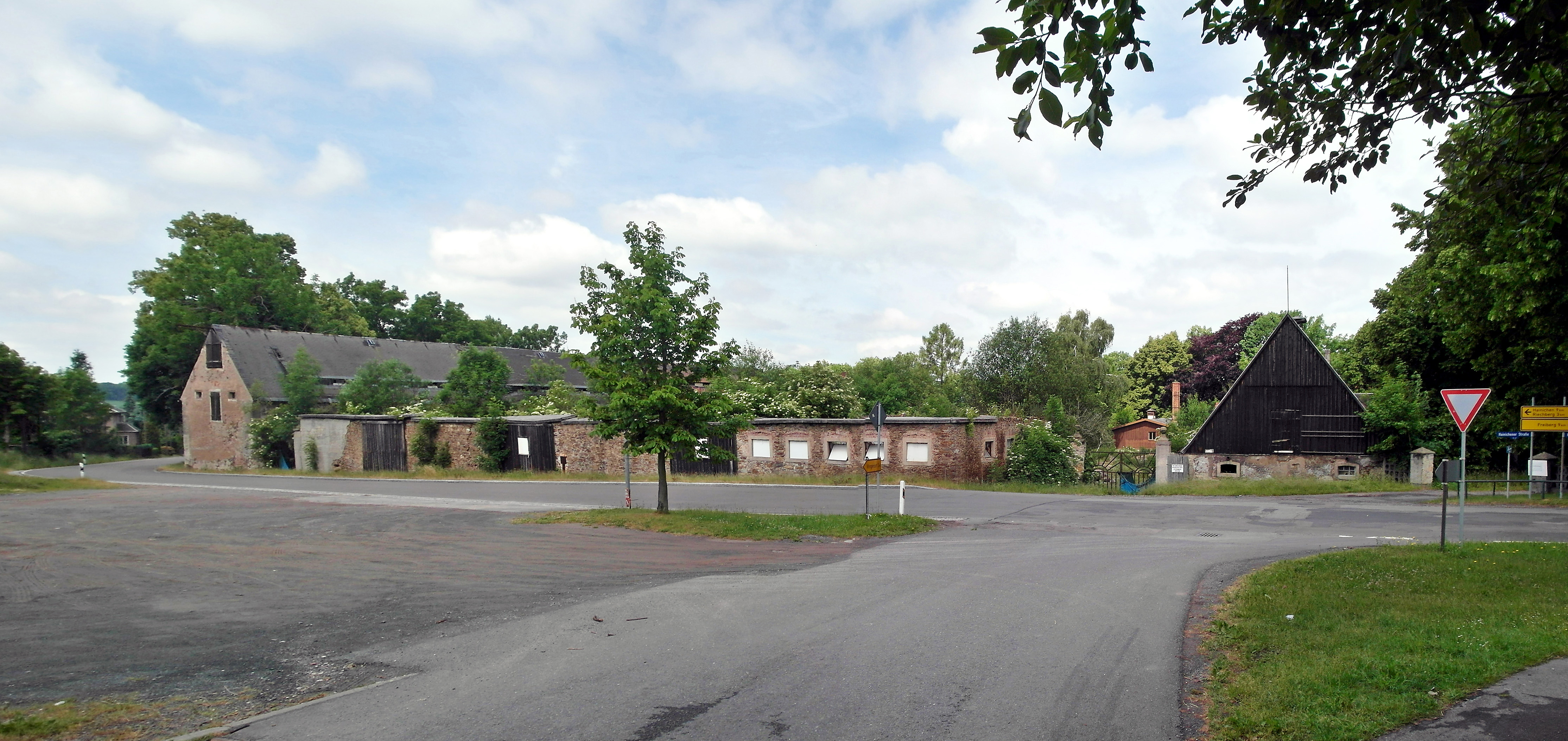 10.06.2015 09600 Bräunsdorf (Oberschöna), Hainichener Str. 27 (GMP: 50.937760,13.218484): Rittergut Bräunsdorf, Sicht von der Straße aus Südosten. [SAM0790-0791.JPG]20150610100MDR.JPG(c)Blobelt